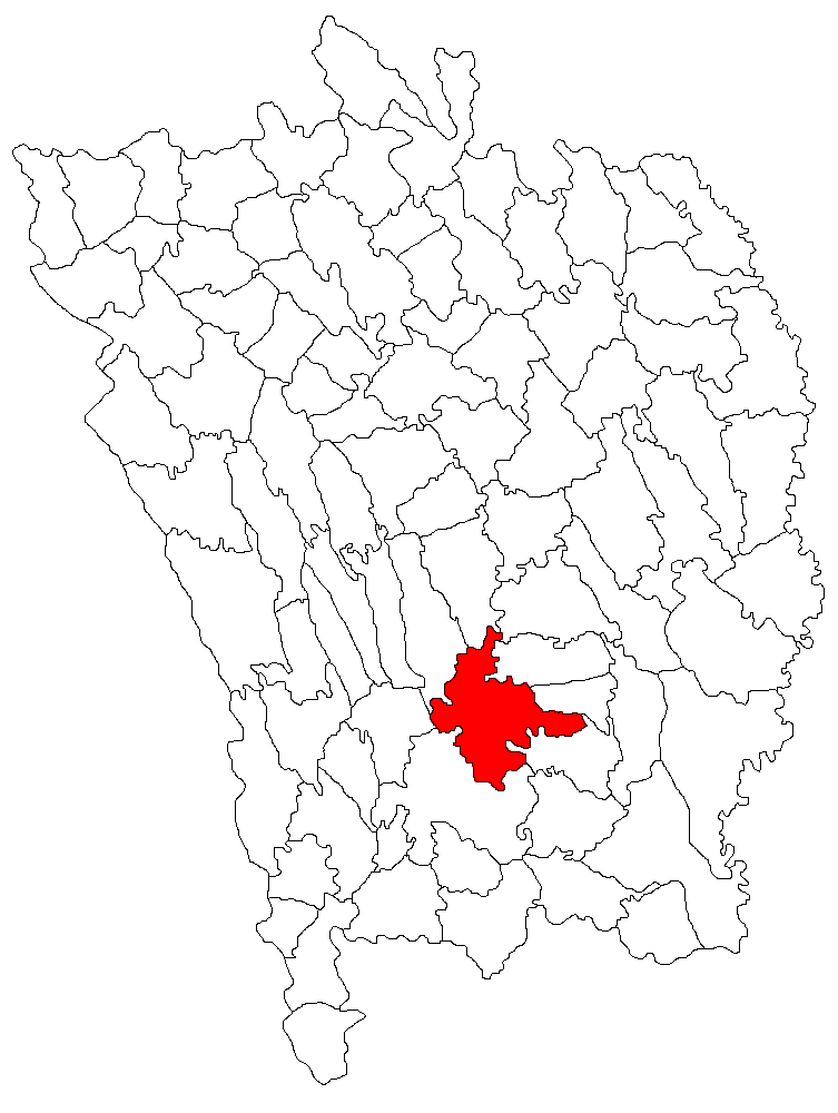 Categorie:Hărţi ale judeţului Vaslui